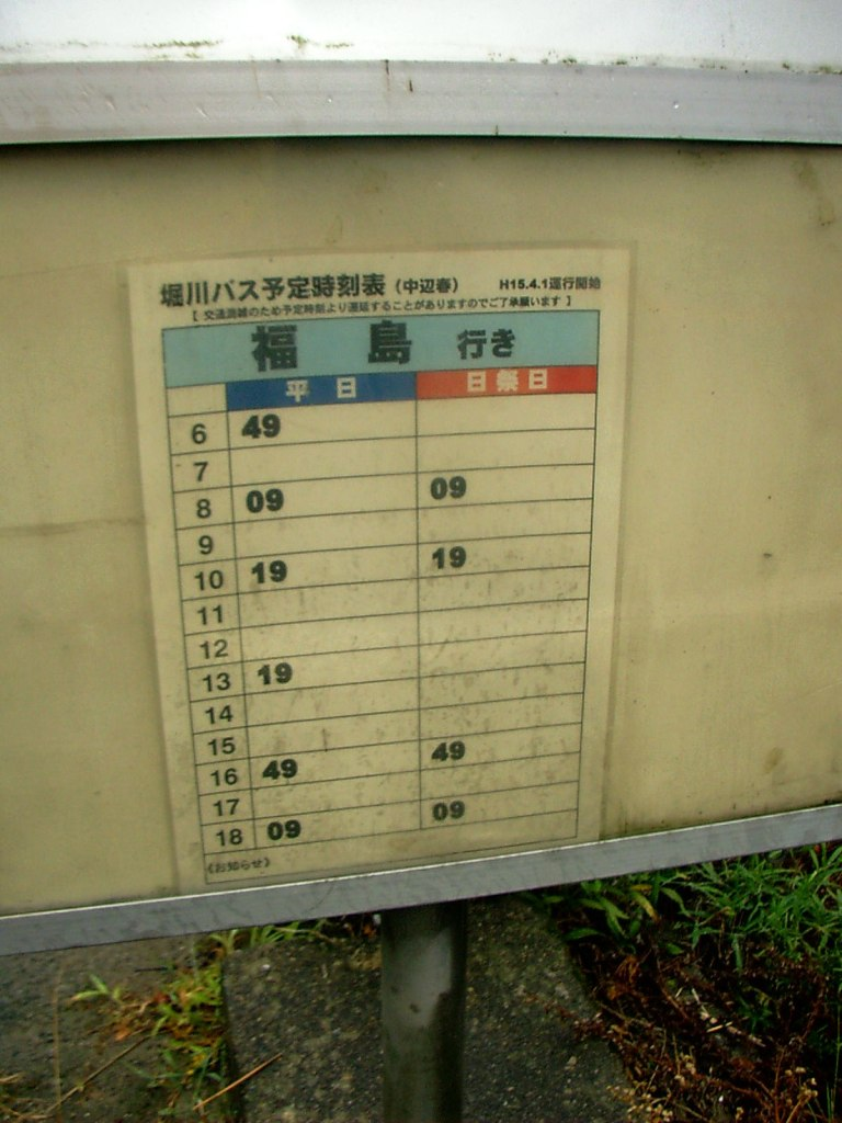 堀川バス 中辺春停留所に掲示されている時刻表